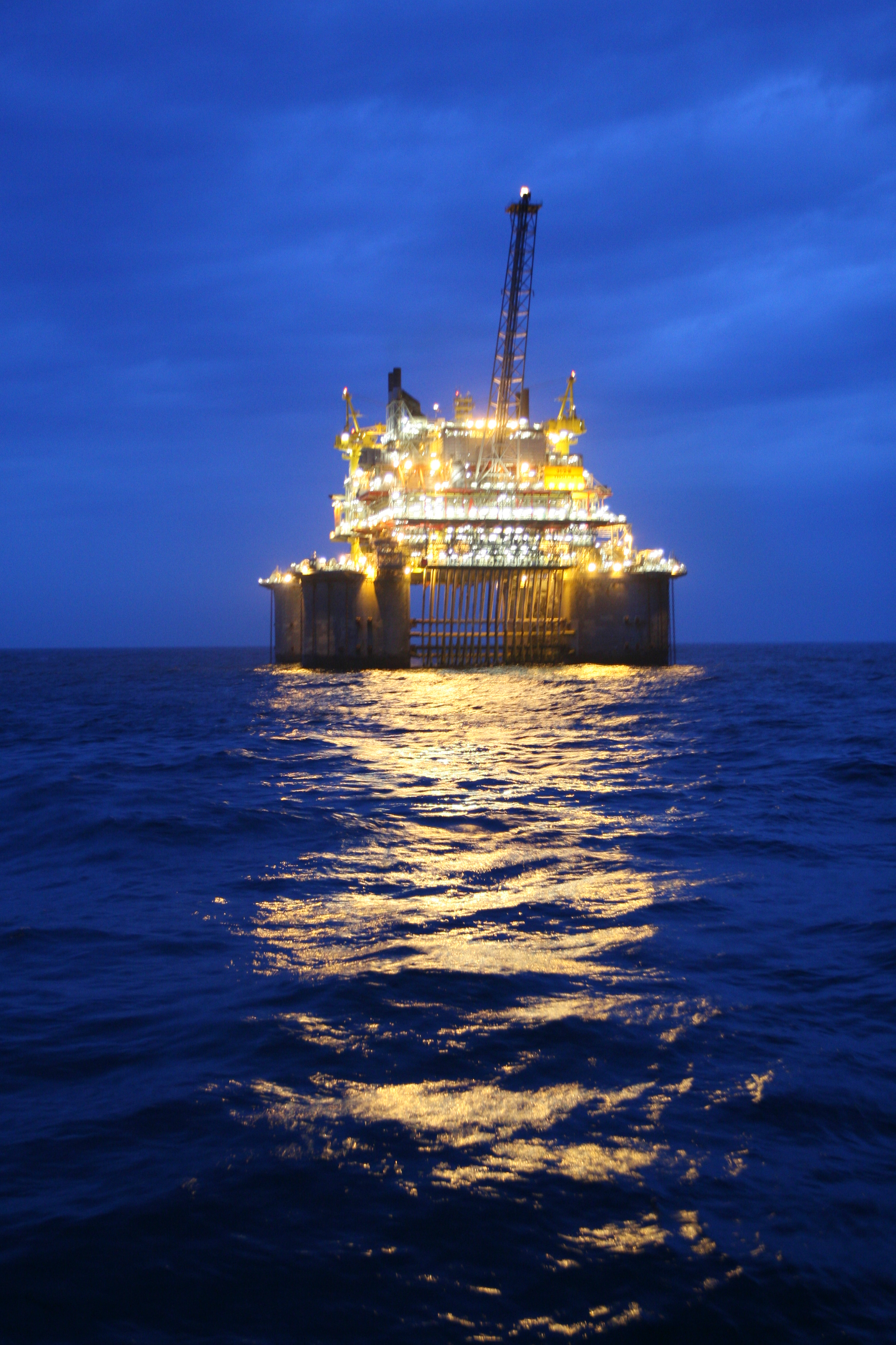 Verdens eneste semi sub av betong